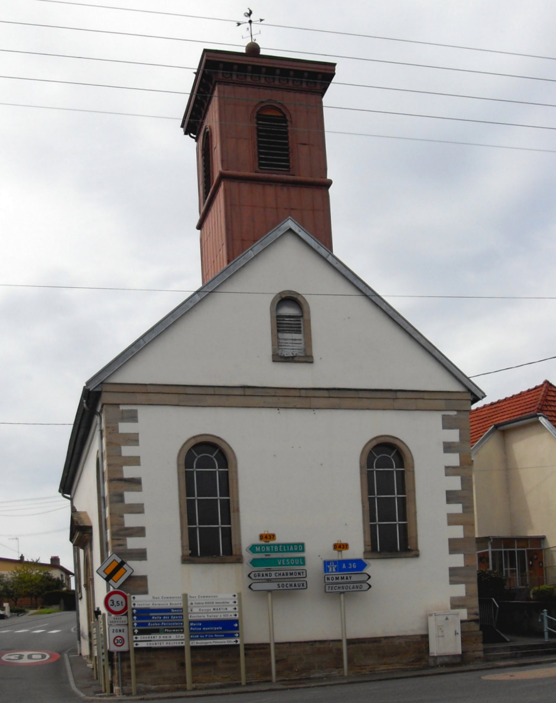 Le temple protestant à Vieux-Charmont